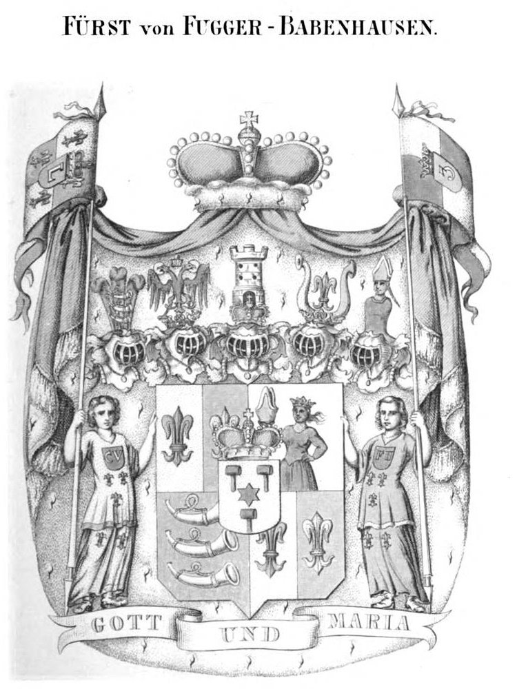 Wappen Fugger Babenhausen - Tyroff HA.jpg